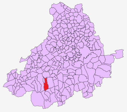 Hoyos del Espino